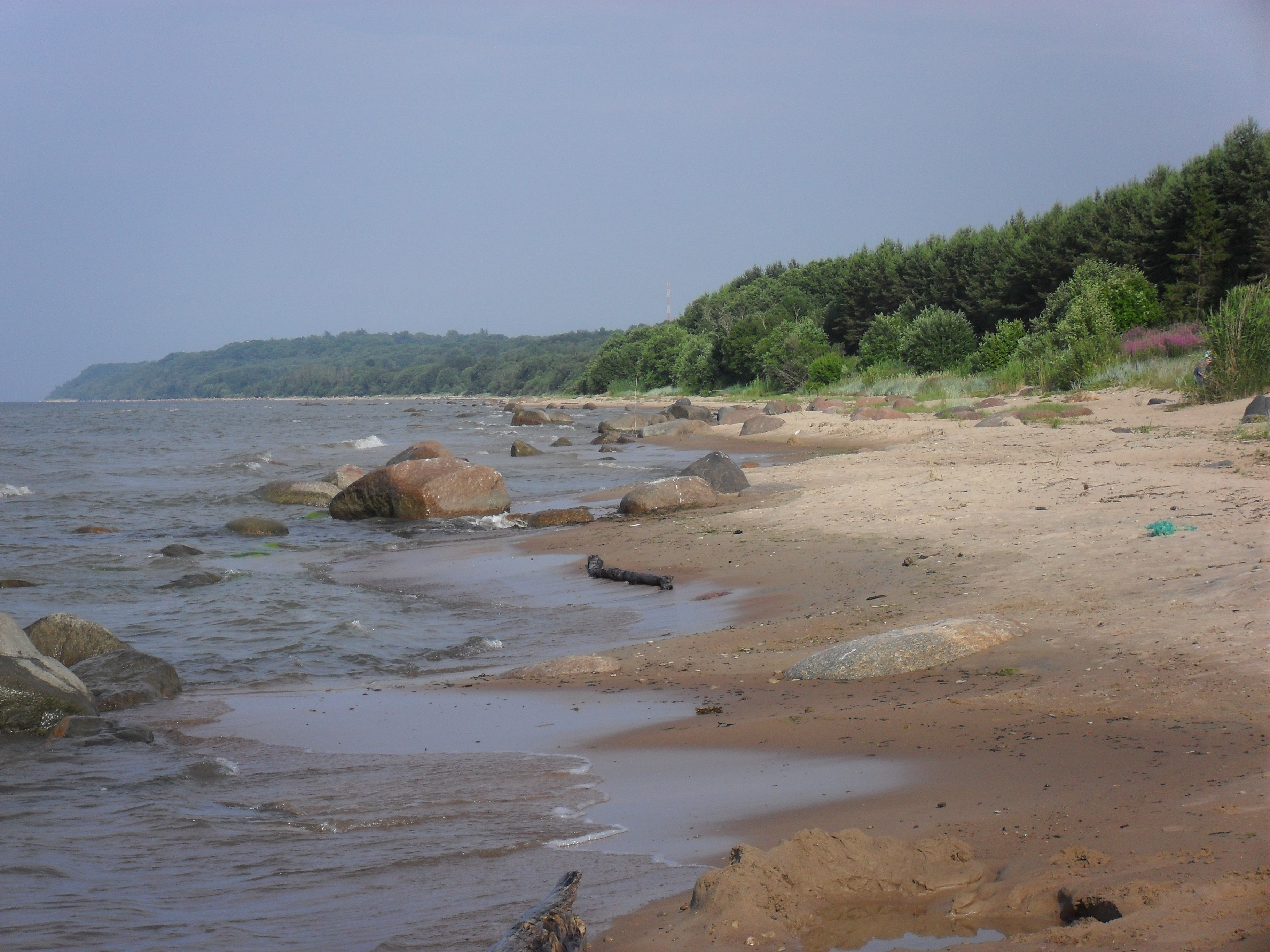 Moldova rand Ida-Virumaal Lüganuse vallas.